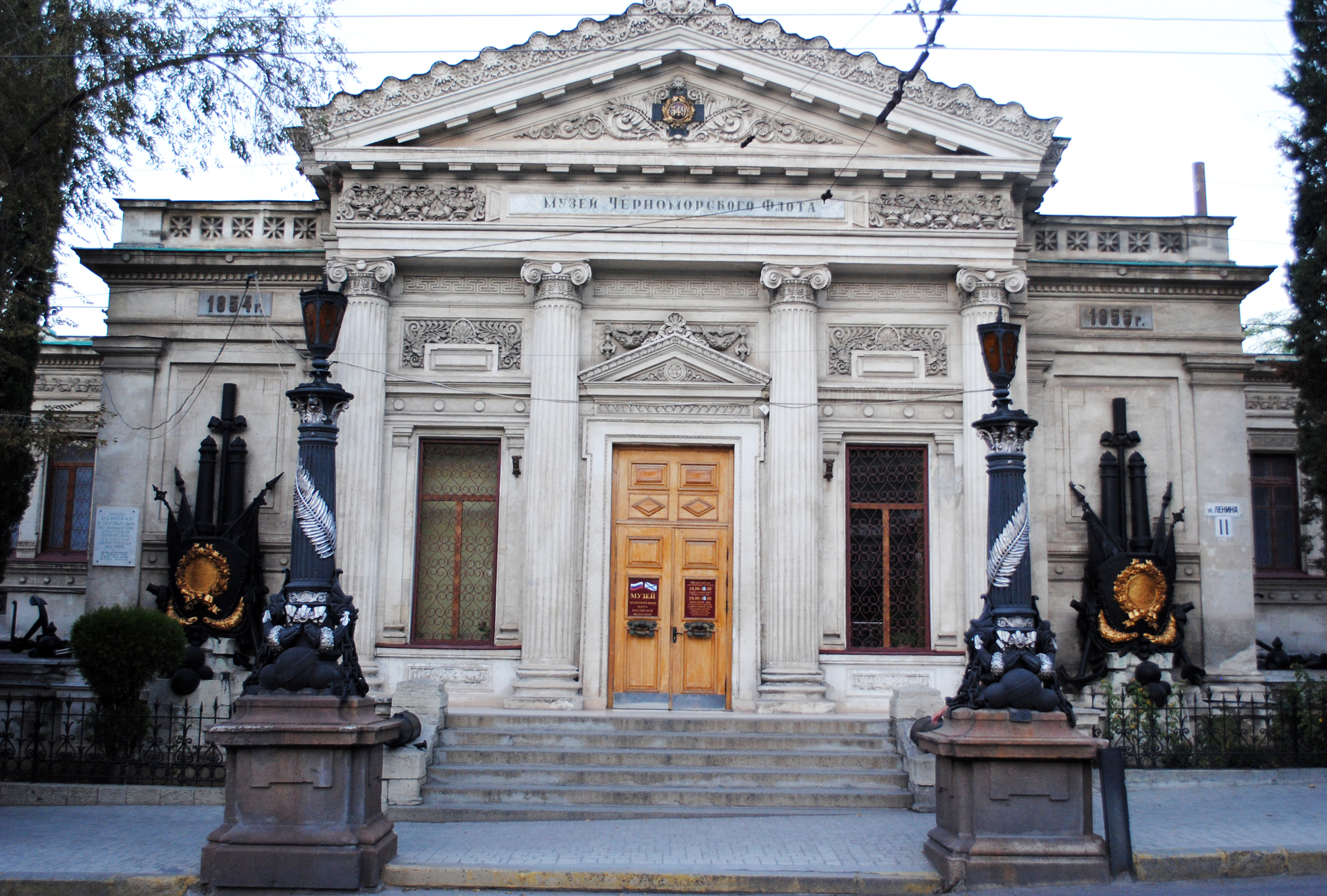 Muzeum Černomořské flotily v Sevastopolu, Ukrajina